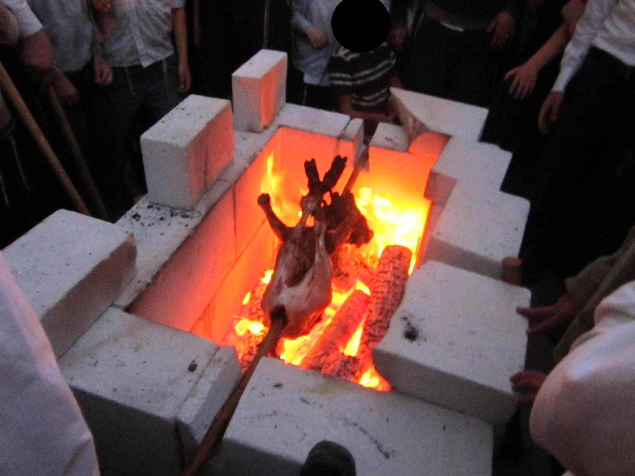 שנת תשע"ב